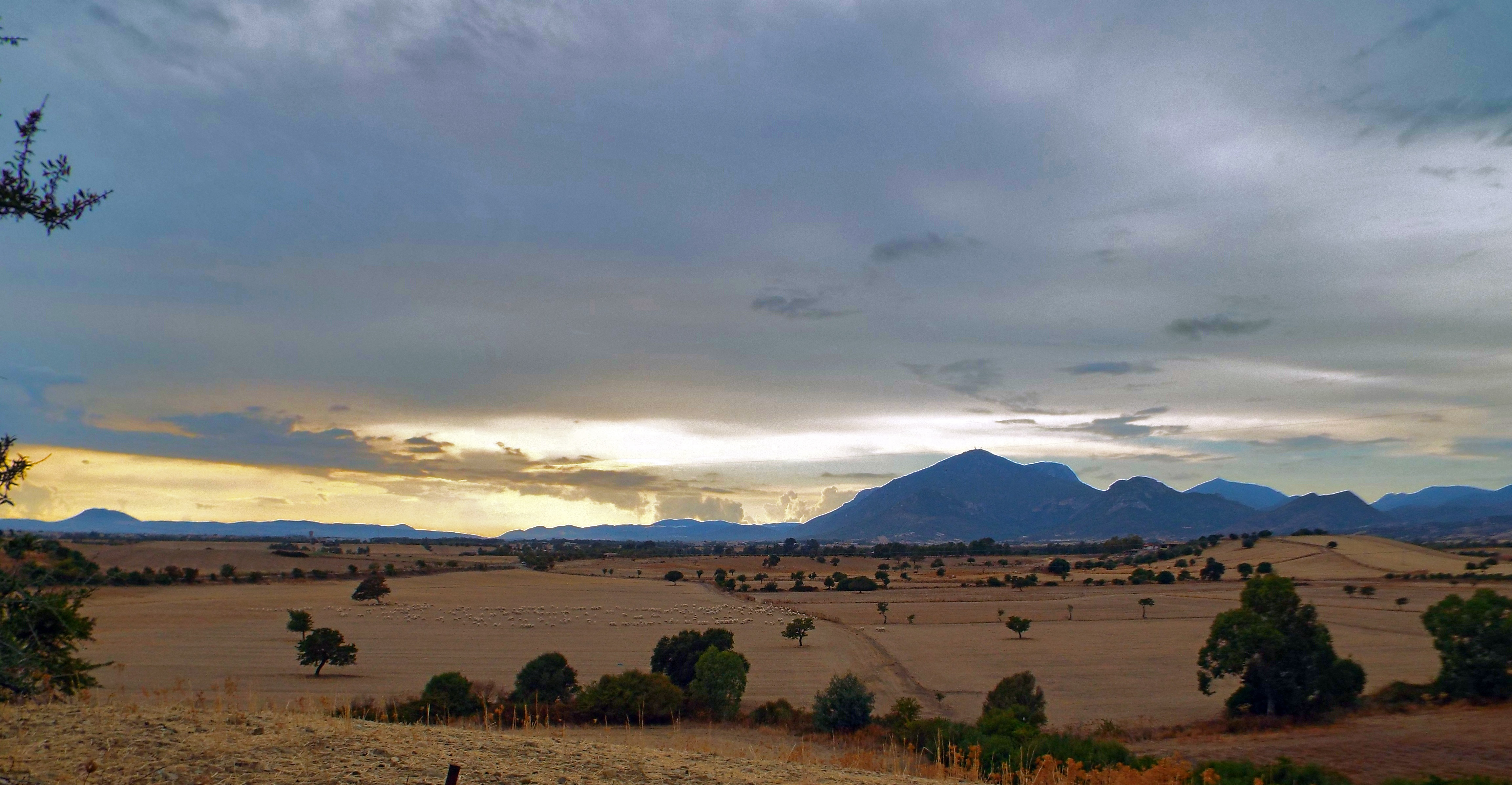 Vista sul territorio del comune di Musei, sullo sfondo al centro l'abitato